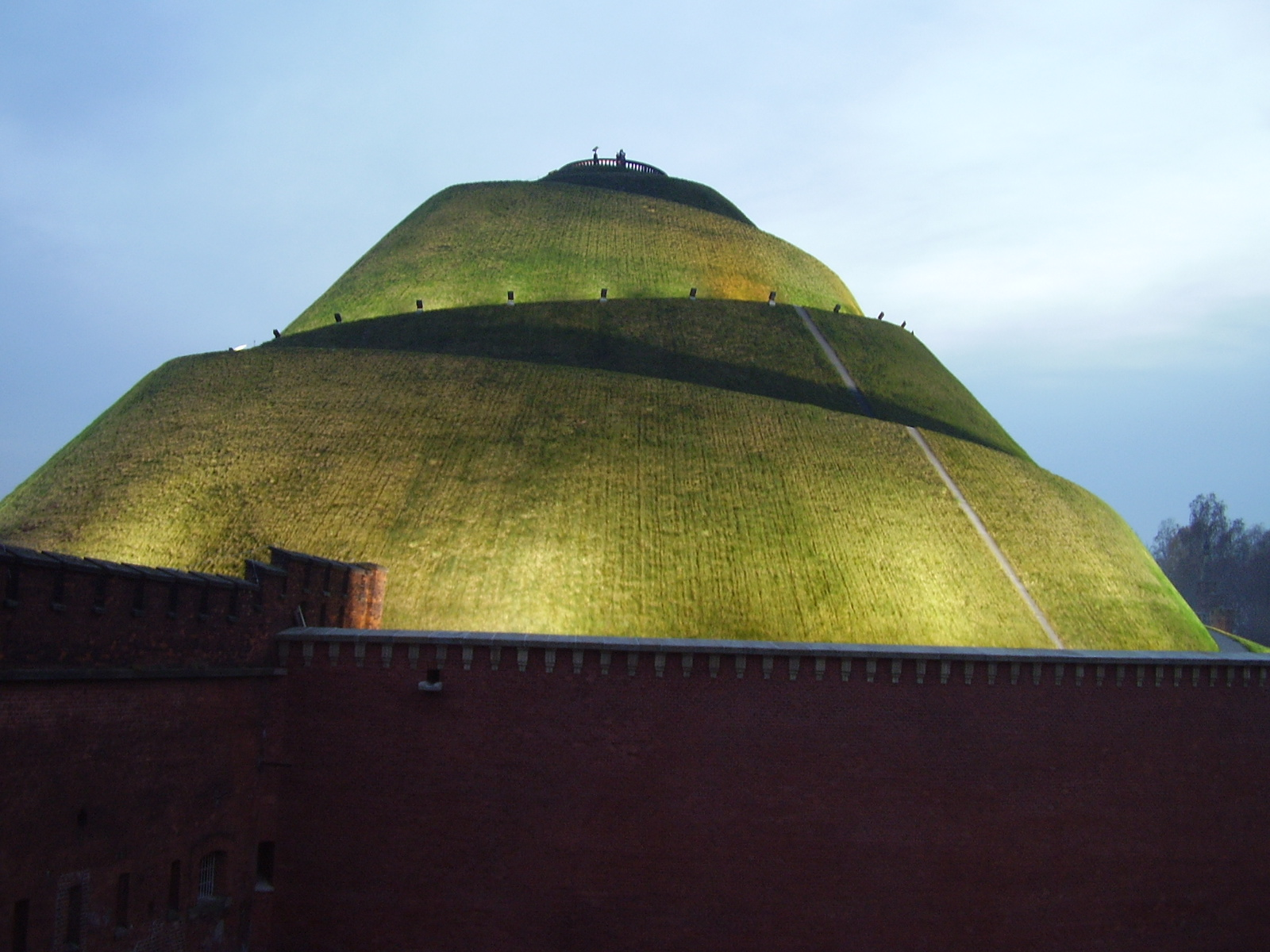 Krakow